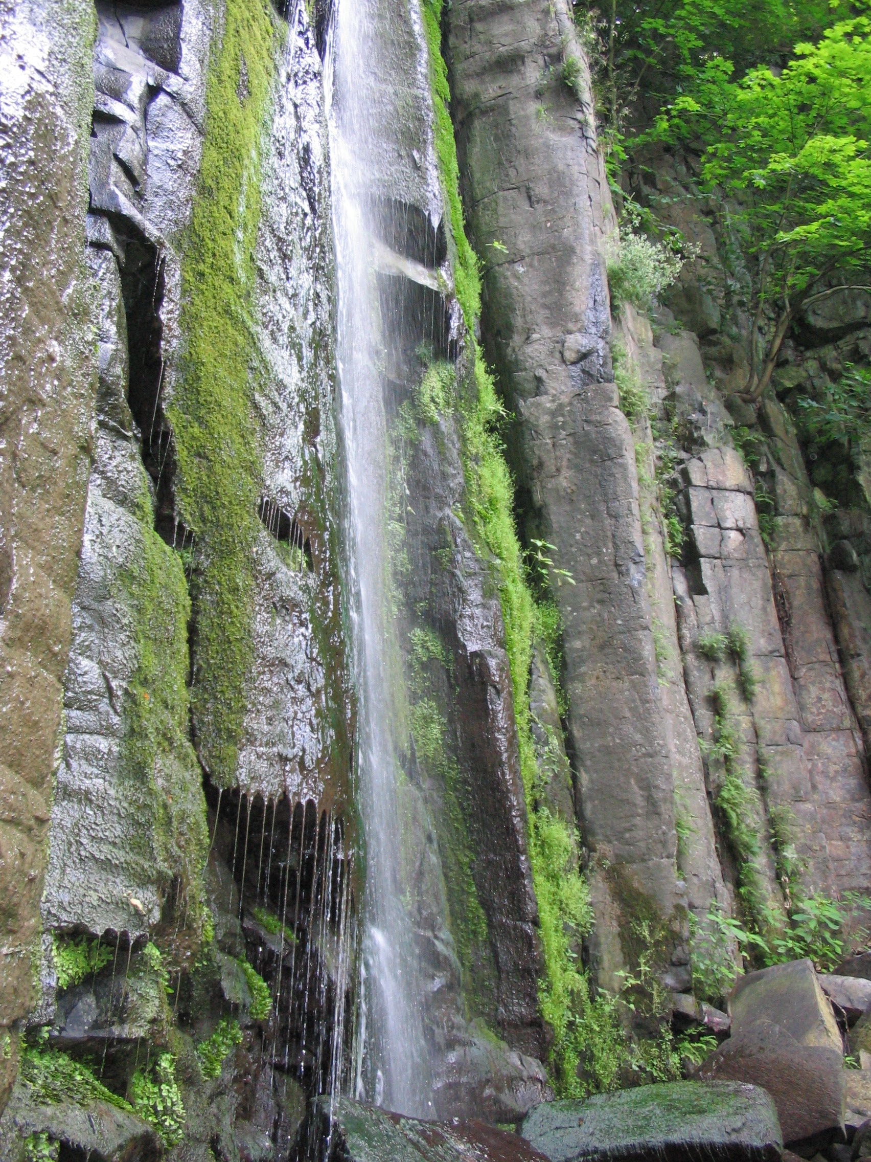 Vaňovský vodopád